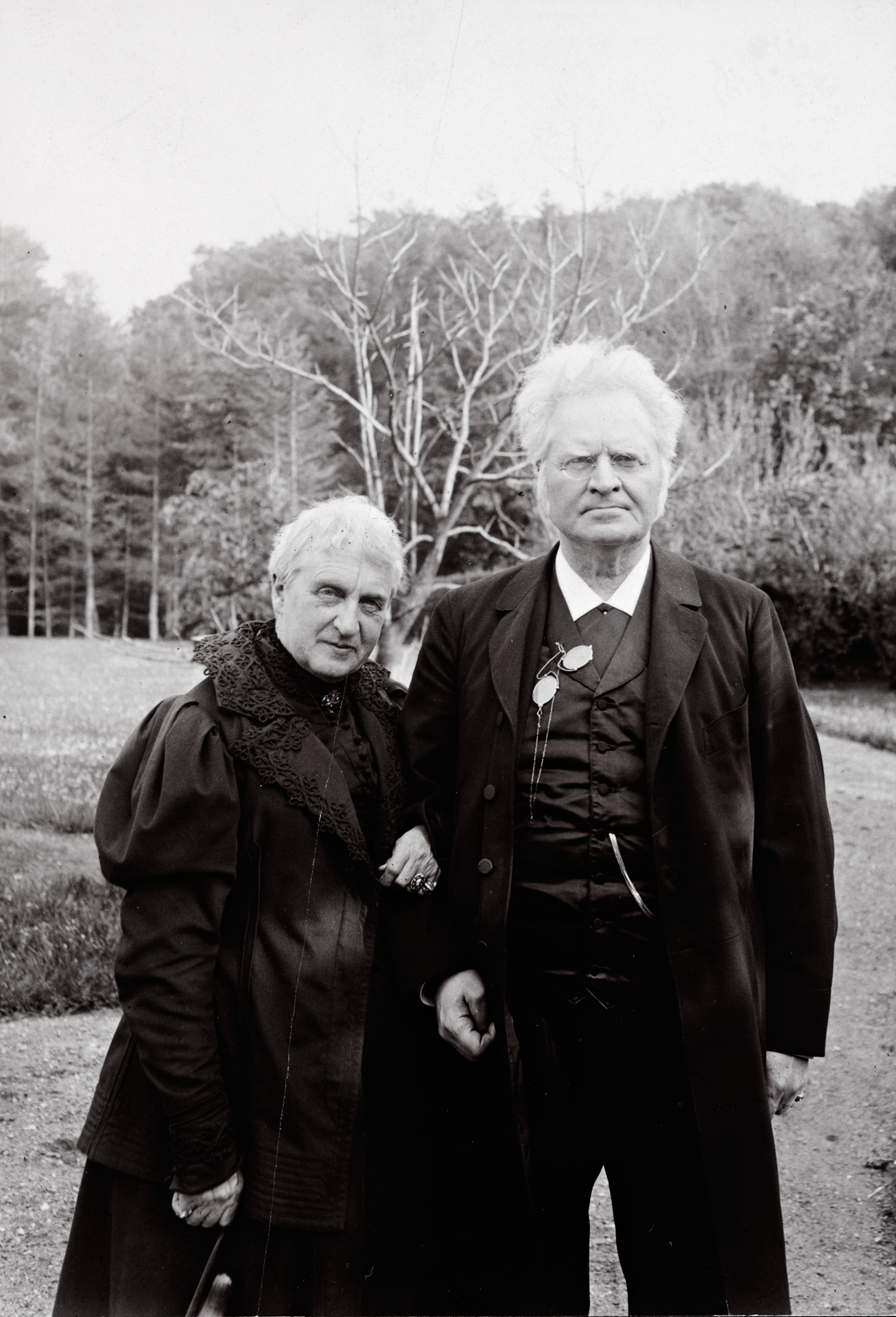 Bjørnstjerne og Karoline Bjørnson hos Jacob Hegel på Skovgaard, Danmark, ca 1902.